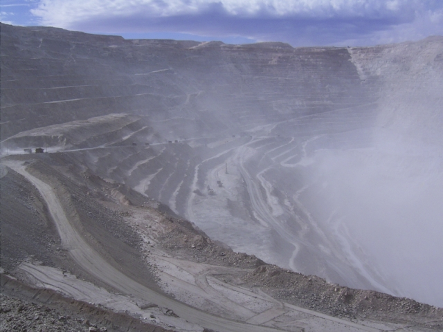 Chuquicamata, die größte Kupfermine der Welt. Caupolican (197502 Byte) (Chuquicamata, selbst fotografiert, GNU-FDL)